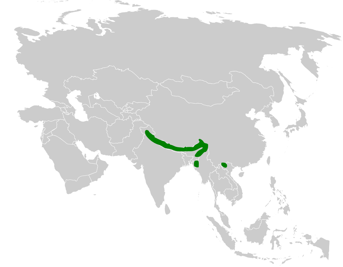 Pnoepyga albiventer distribution map, based on